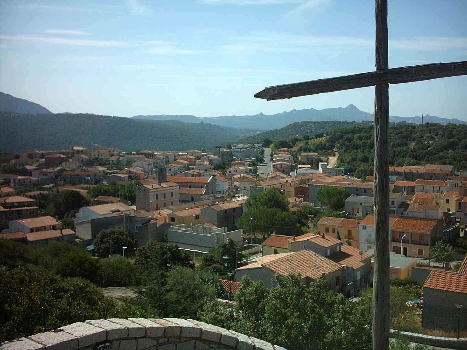 S.Antonio di Gallura (OT) Sardegna - Italy Panorama visto dal belvedere 'Lu Nuraco'